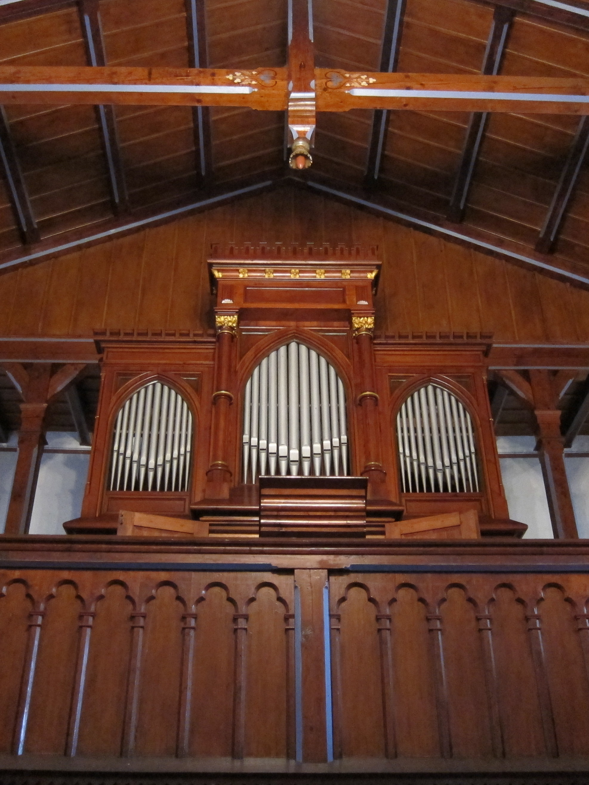 Die Orgel in der Kirche von Goldisthal baute Adam Eifert im Jahre 1892.